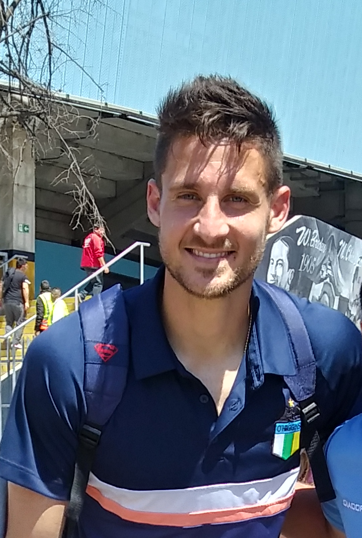 Nicolas Mazzola, futbolista argentino